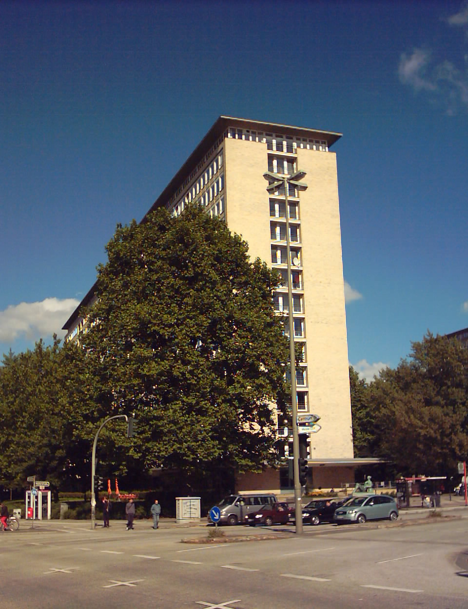 Bildbeschreibung:Eines der Hamburger Grindelhochhäuser an der Ecke Hallerstrasse/Grindelberg Fotograf/Zeichner: Datum: September 2005